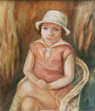 Tableau Annette au chapeau blanc, de Léon Weissberg